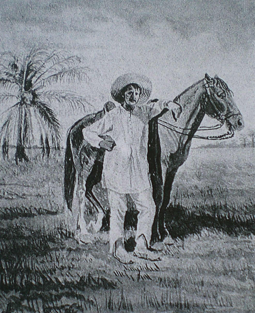 XIX century Venezuelan llanero.